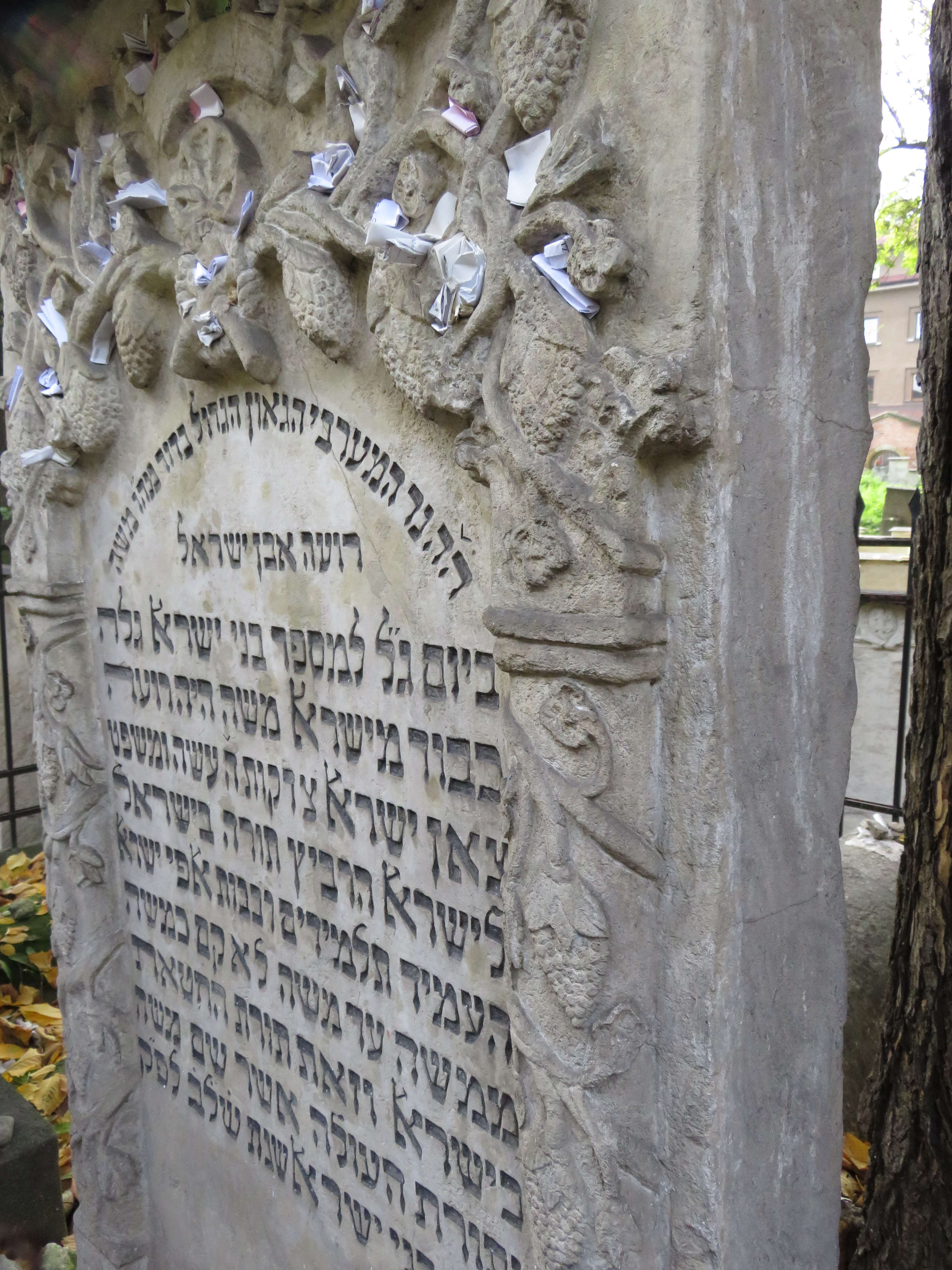 מצבת הרמ"א. בית הקברות היהודי העתיק בקרקוב (1).jpg